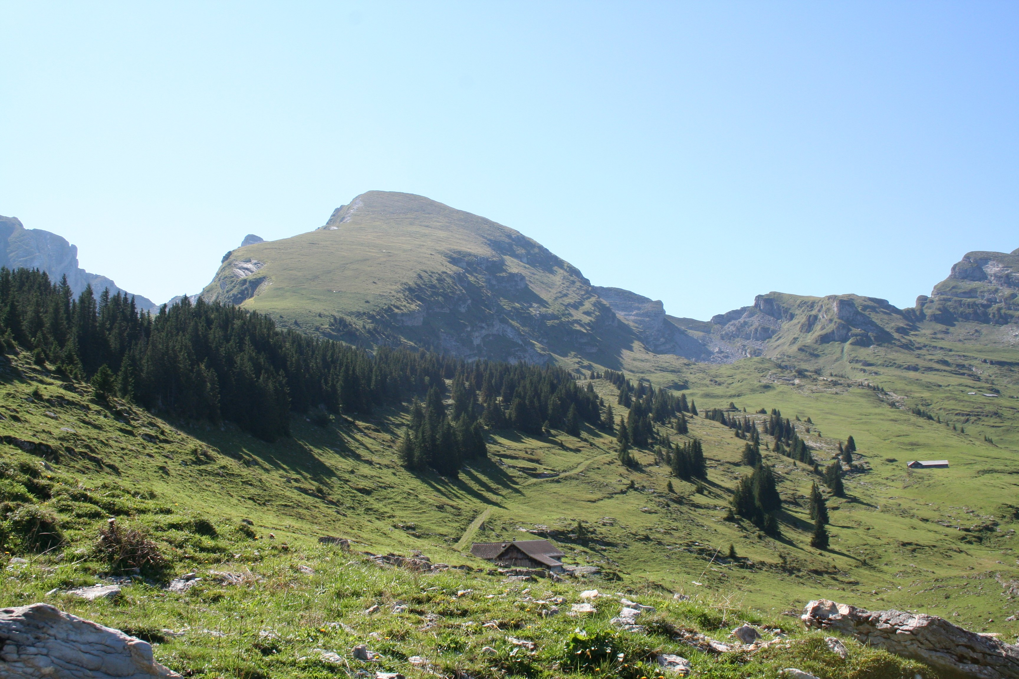 Selun Westseite